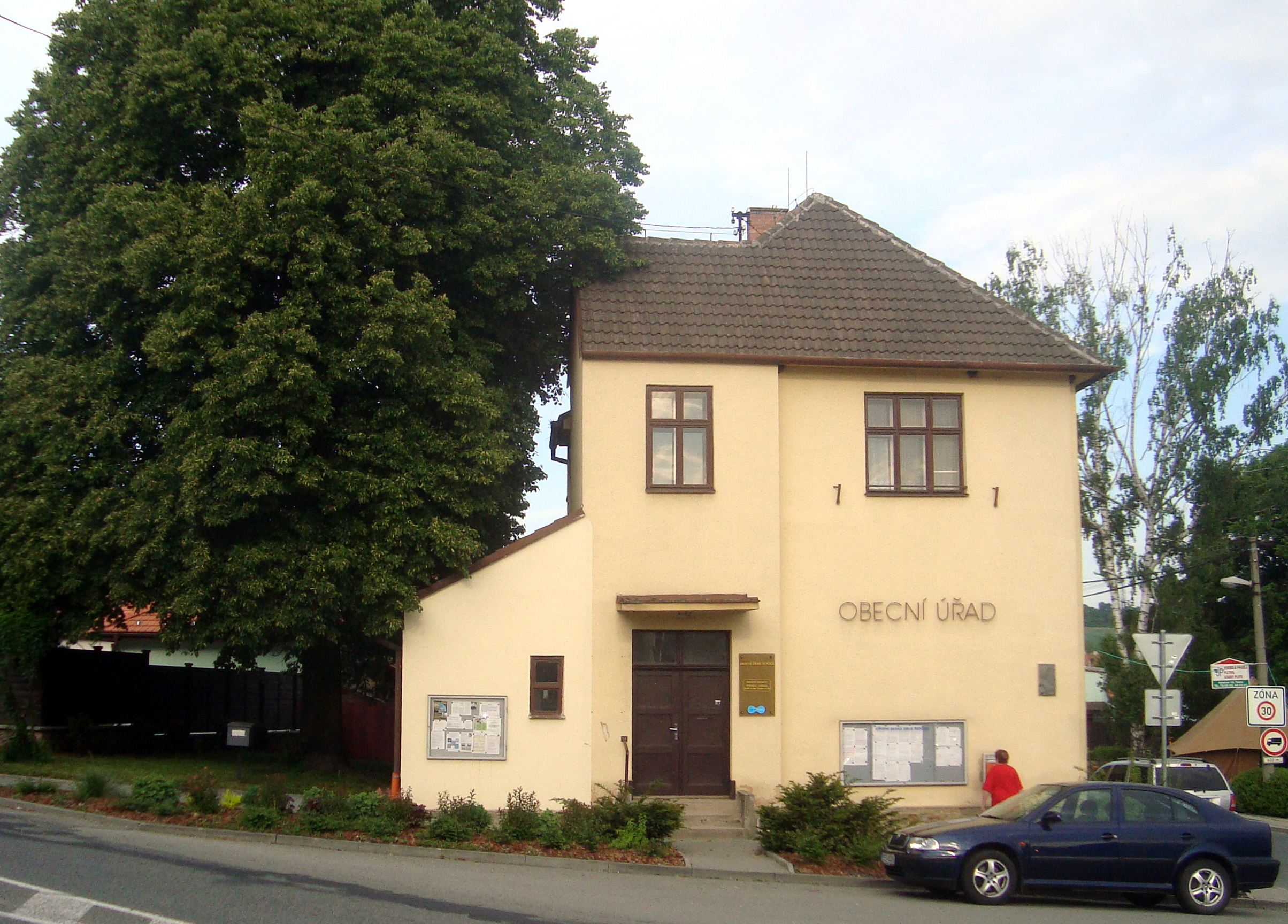 Tetčice - obecní úřad